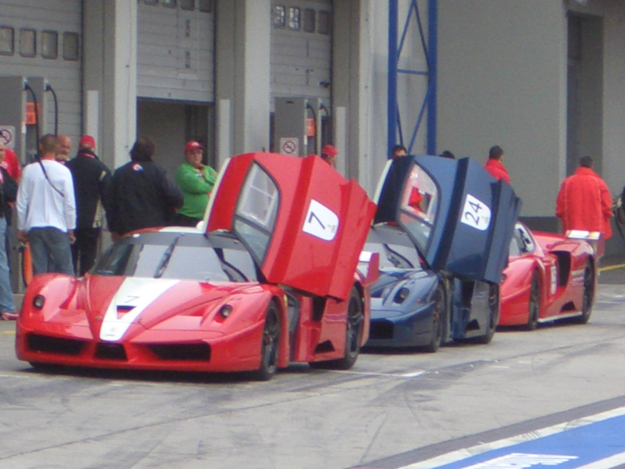 Ferrari-Racing-Day`s 2006, Nürburgring, 03.09.2006. FXX-Box.